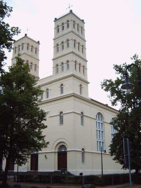 Dorfkirche von Straupitz, Land Brandenburg, Deutschland Bild aufgenommen am 30.6.2006 von Olaf Meister